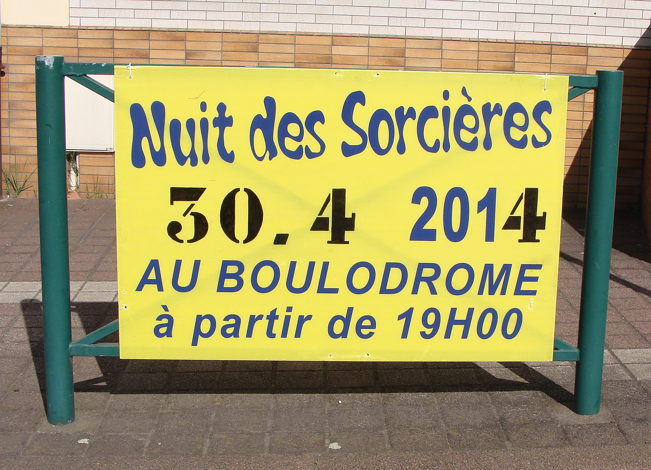 Affiche de la "Nuit des Sorcières" de 2014, fête organisée par la ville de L'Hôpital (Moselle) le 30 avril.